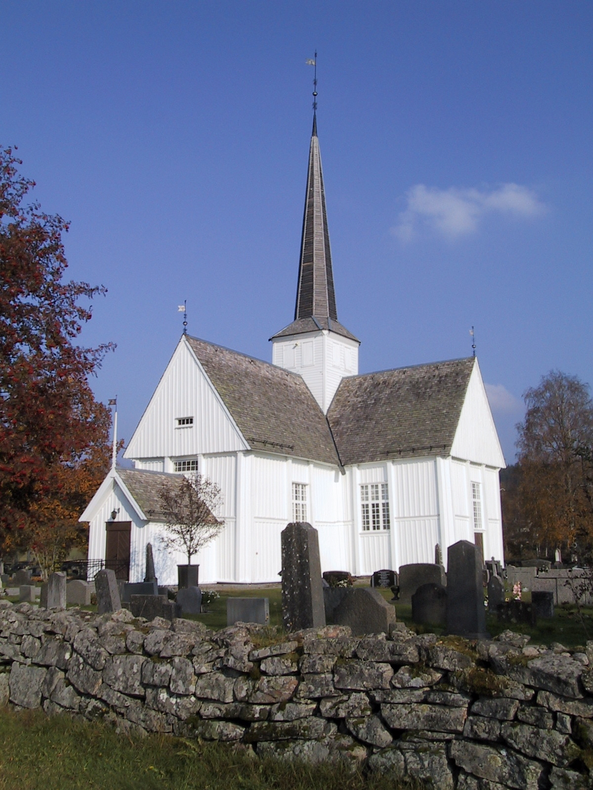 Eidskog kirke